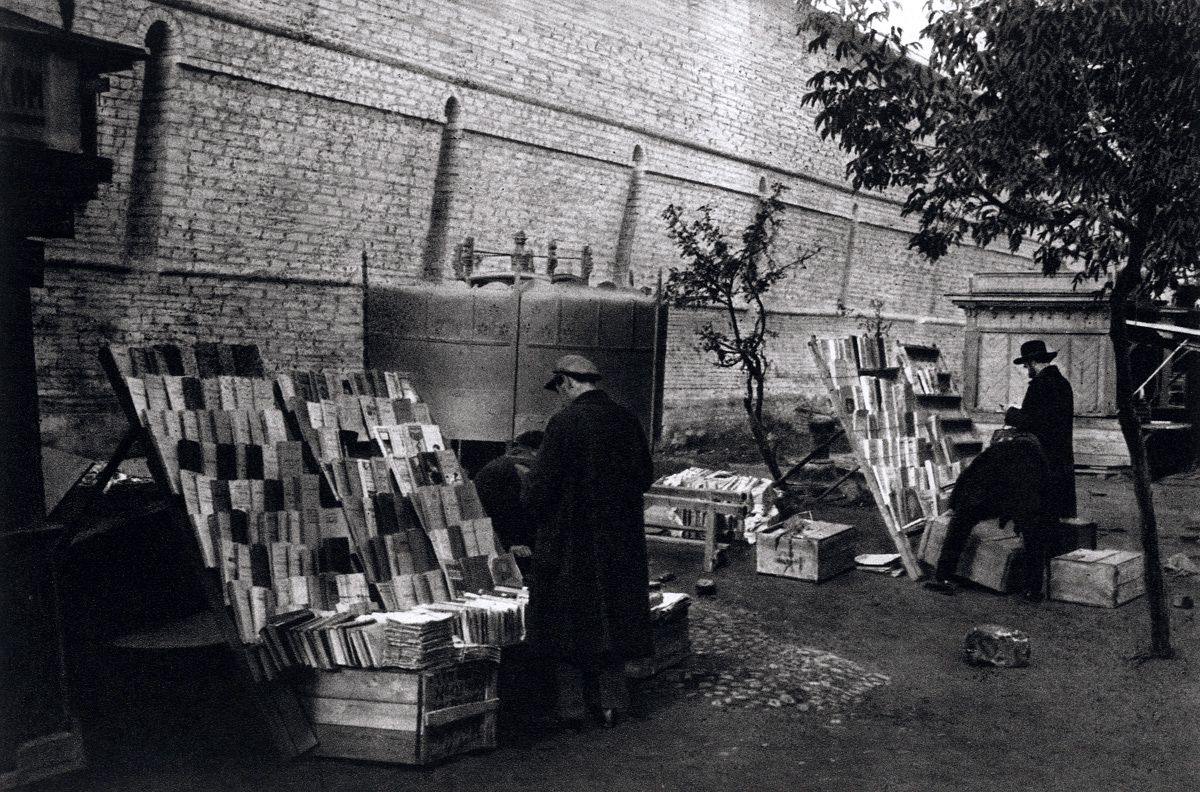 Книжные развалы у кремлевских стен